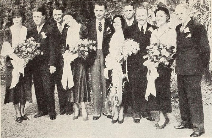 Wesley Ruggles e Arline Judge (al centro) nel giorno del loro matrimonio